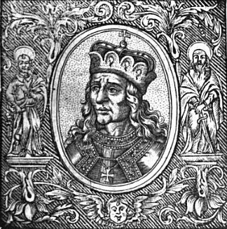 Soběslav II.